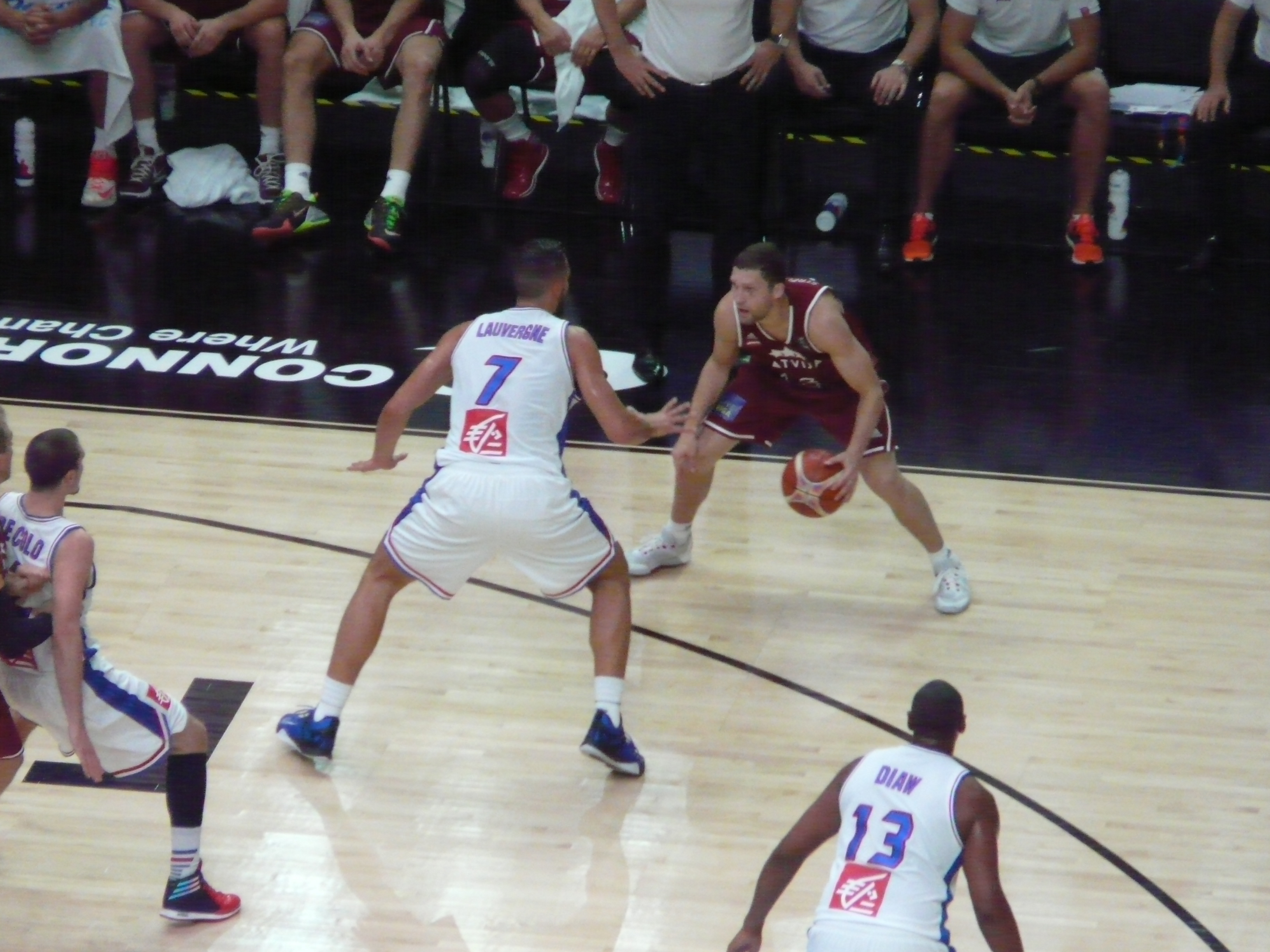 Jānis Strēlnieks (#13) au dribble lors du quart de finale de l'EuroBasket 2015 entre la France et la Lettonie, le 15 septembre 2015.